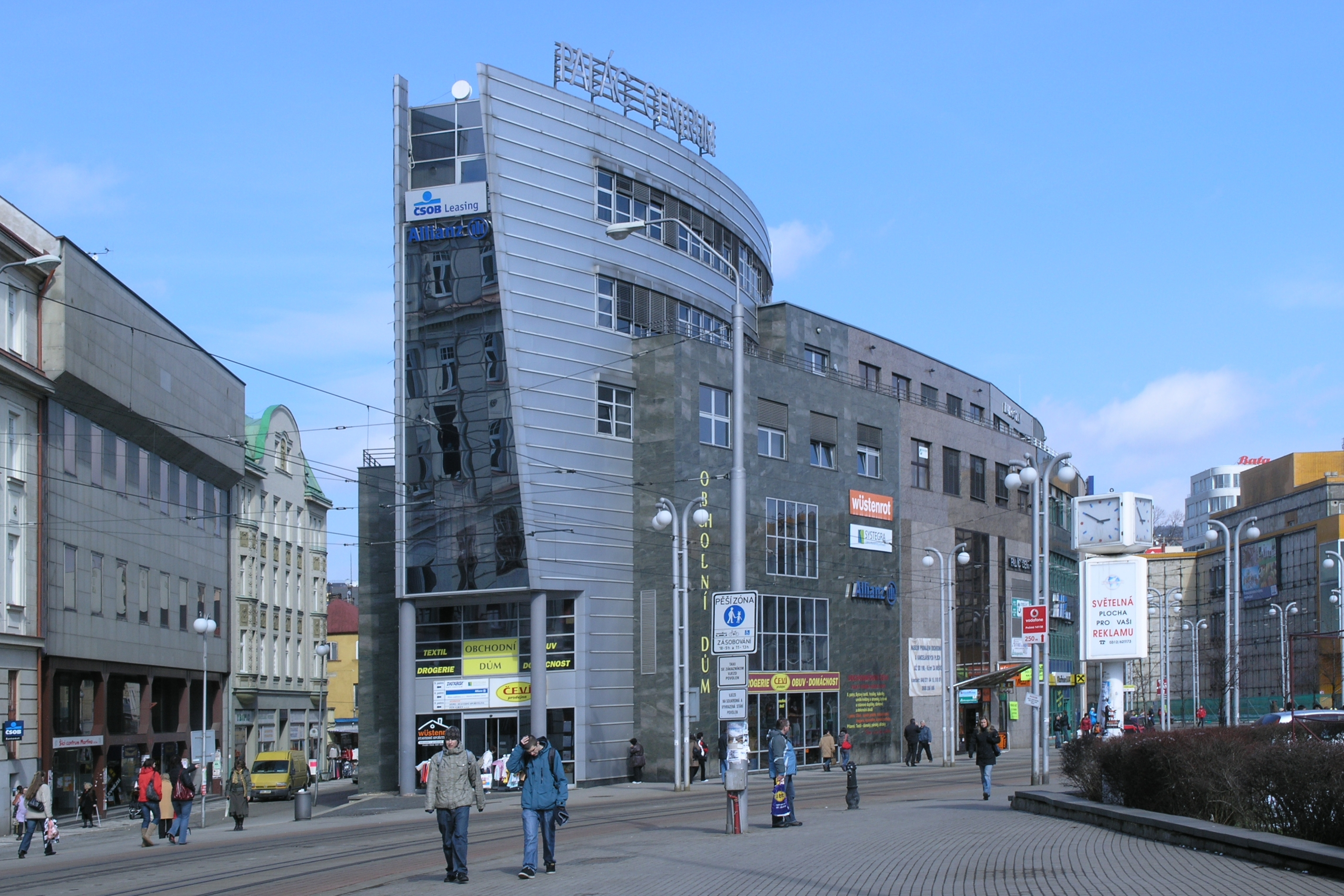 Liberec